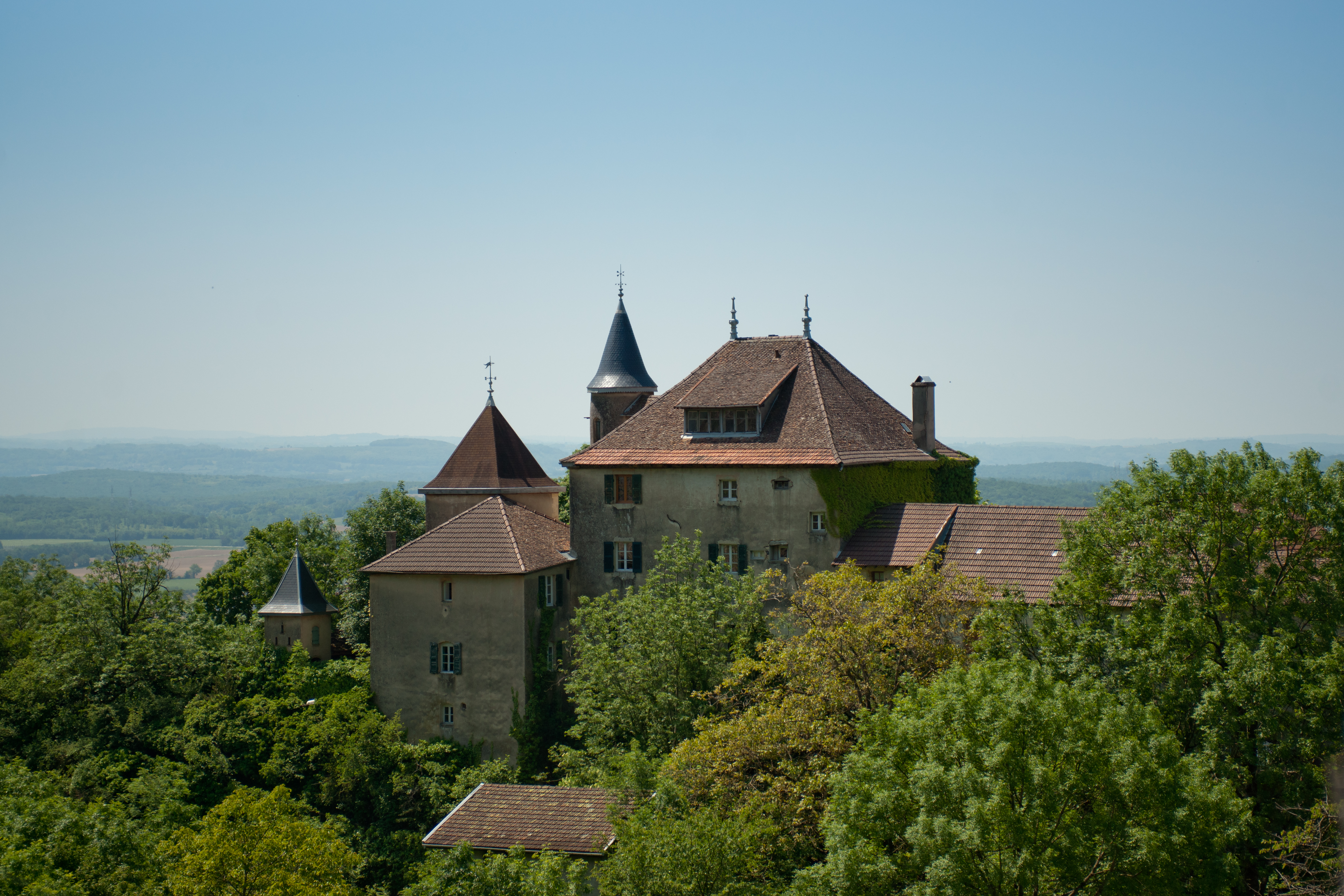 Château de Montagnieu